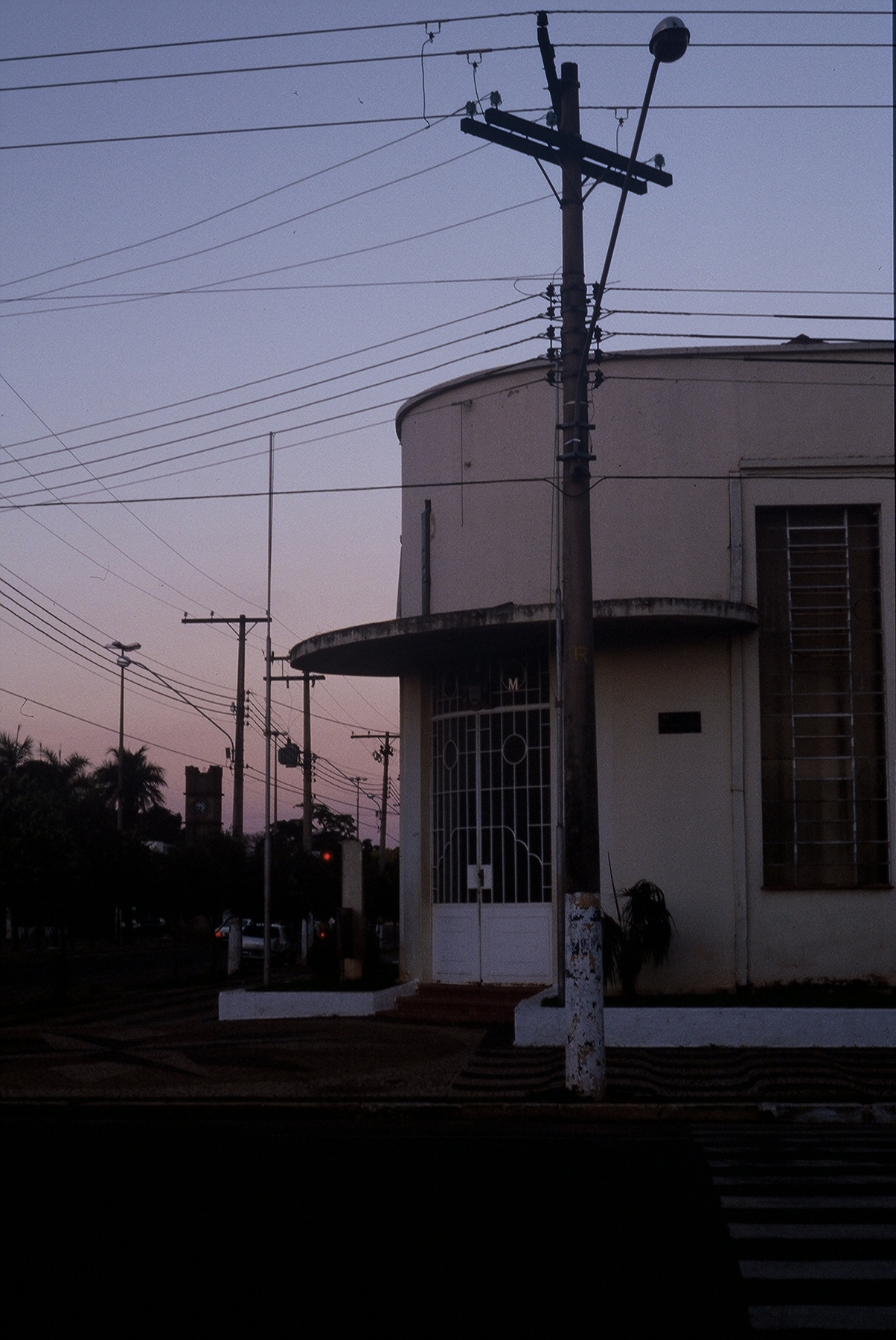 Prefeitura de Três Lagoas, tendo ao fundo o Relógio Central.